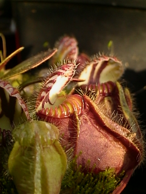 Zwergkrug (Cephalotus follicularis)